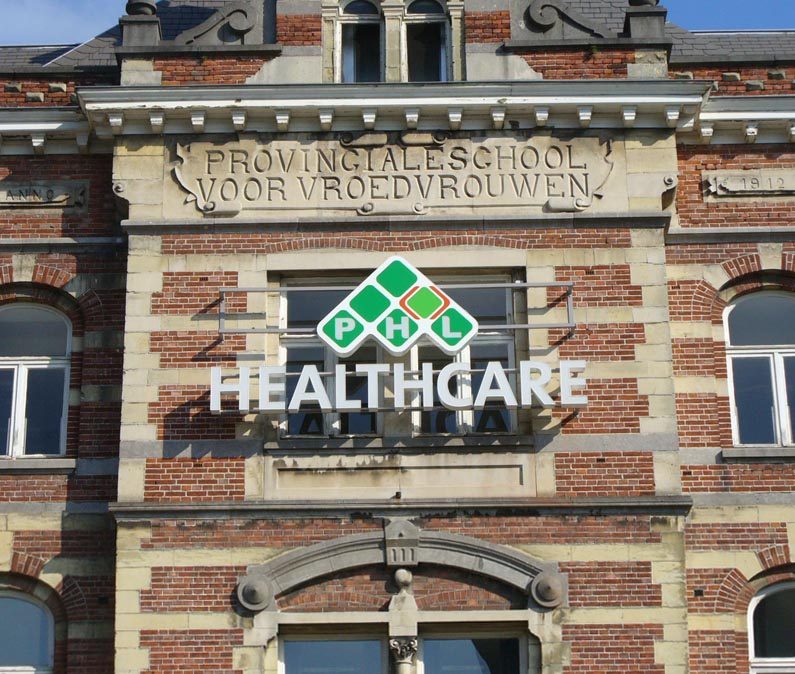 Voorgevel van Provinciale Hogeschool Limburg departement Verpleegkunde met opschrift HEALTHCARE